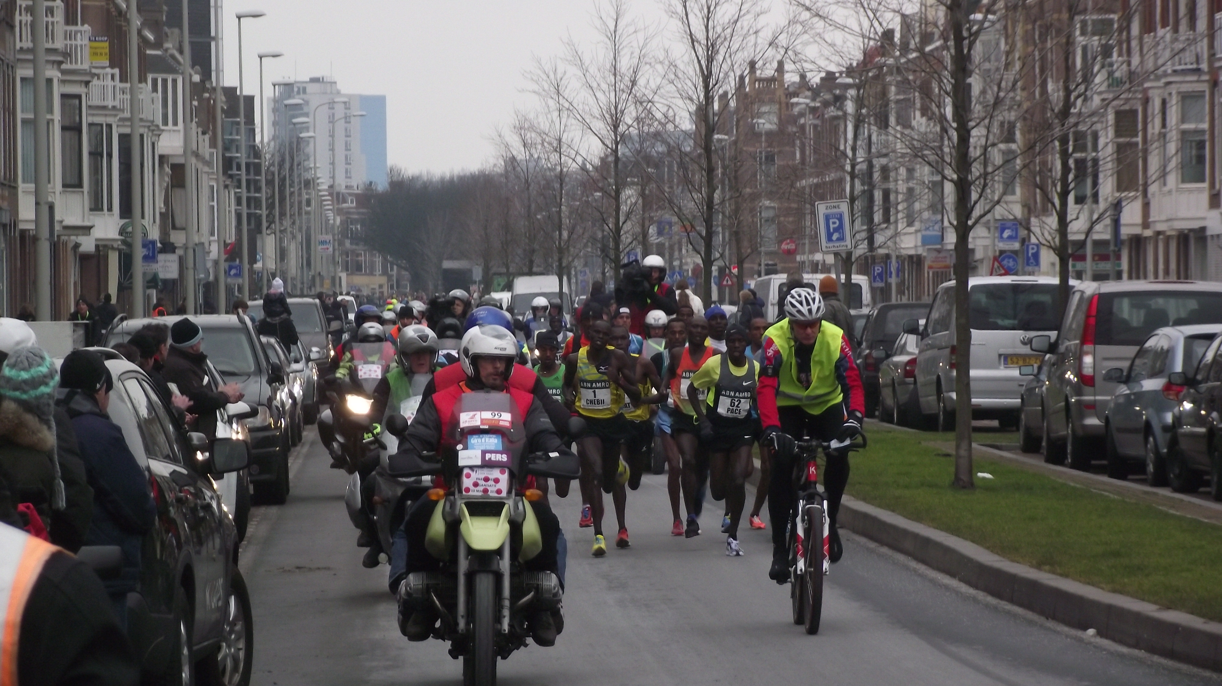 De City-Pier-City Loop 2013 op de Valkenboslaan met de eerste renner.